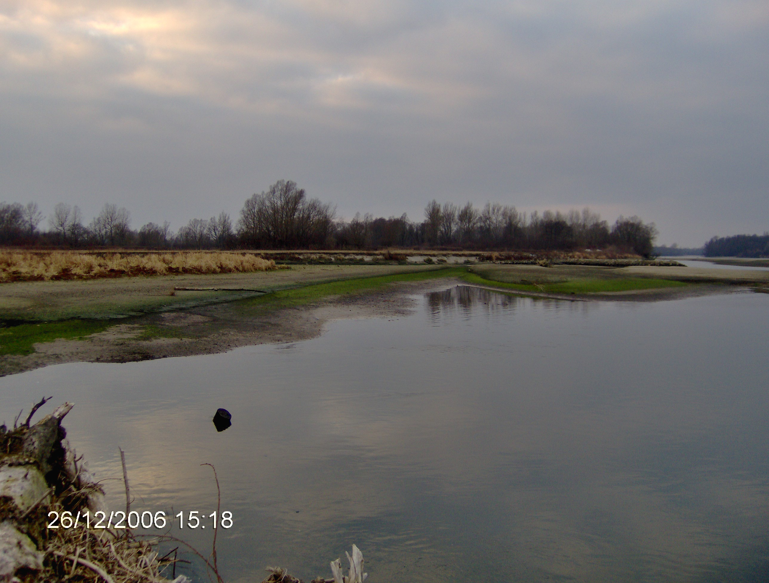 drava ferdinandovac croatia 3